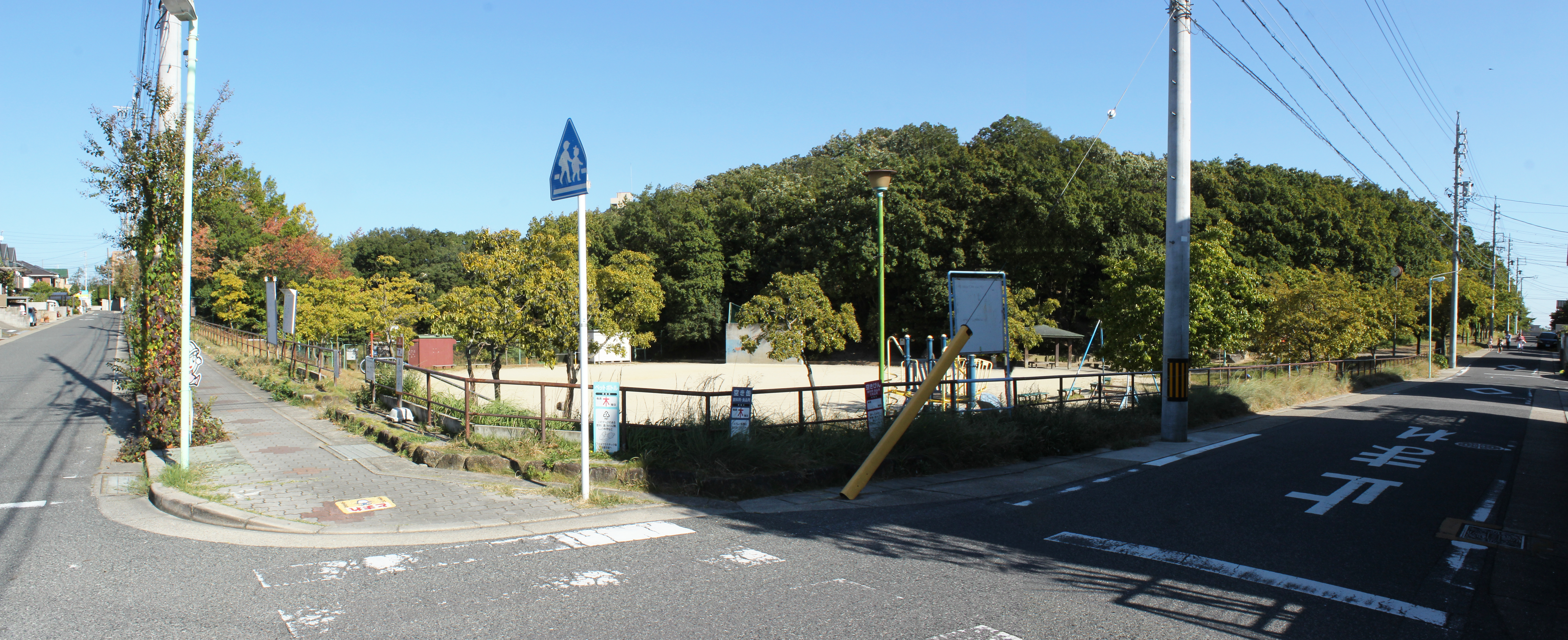 島田緑地 南西側